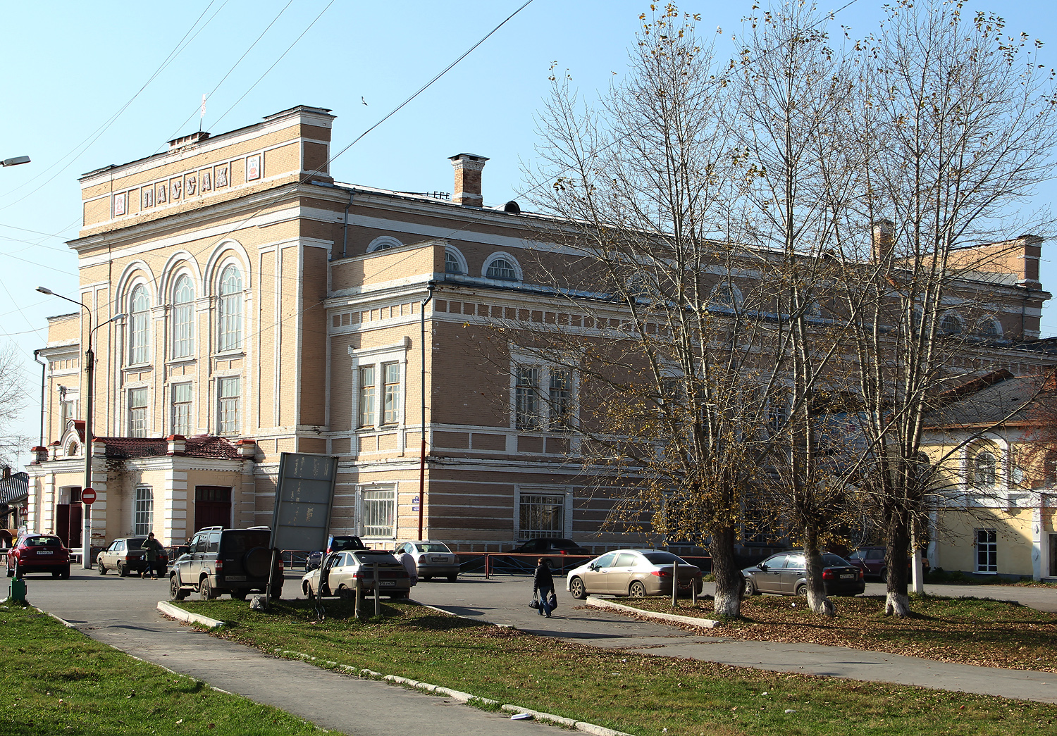 здание пассажа - главного павильона ирбитской ярмарки: улица ленина, 21, Ирбит, Свердловская область